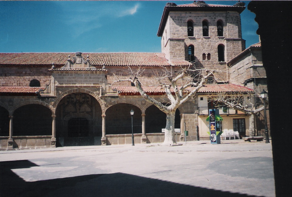 Iglesia de la Asunción. Piedrahíta (Ávila).